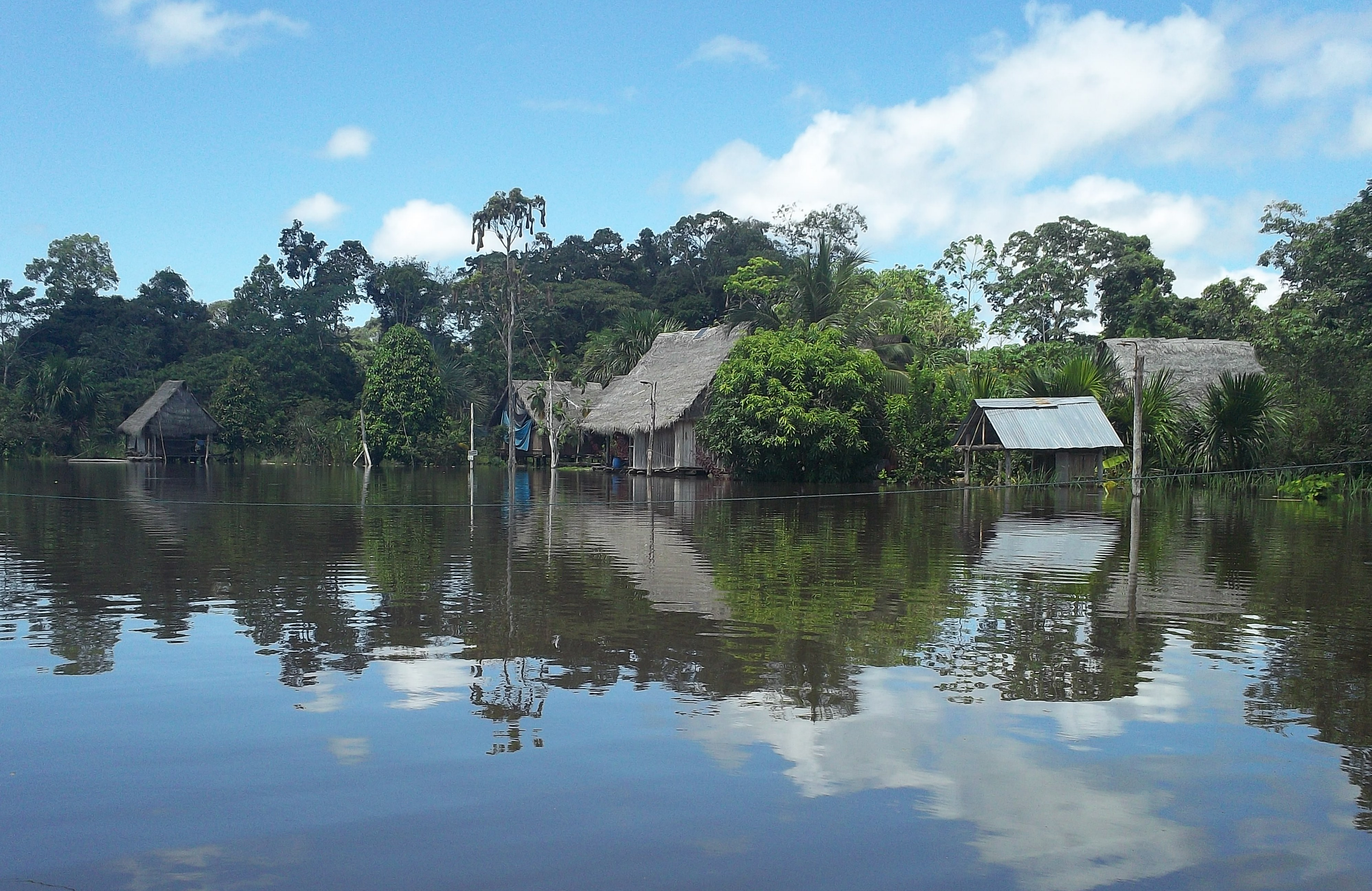 Vesnice Nuevo Jerusalen na řece Tahuayo v době jarní záplavy, nedaleko soutoku Ucayali a Maraňonu